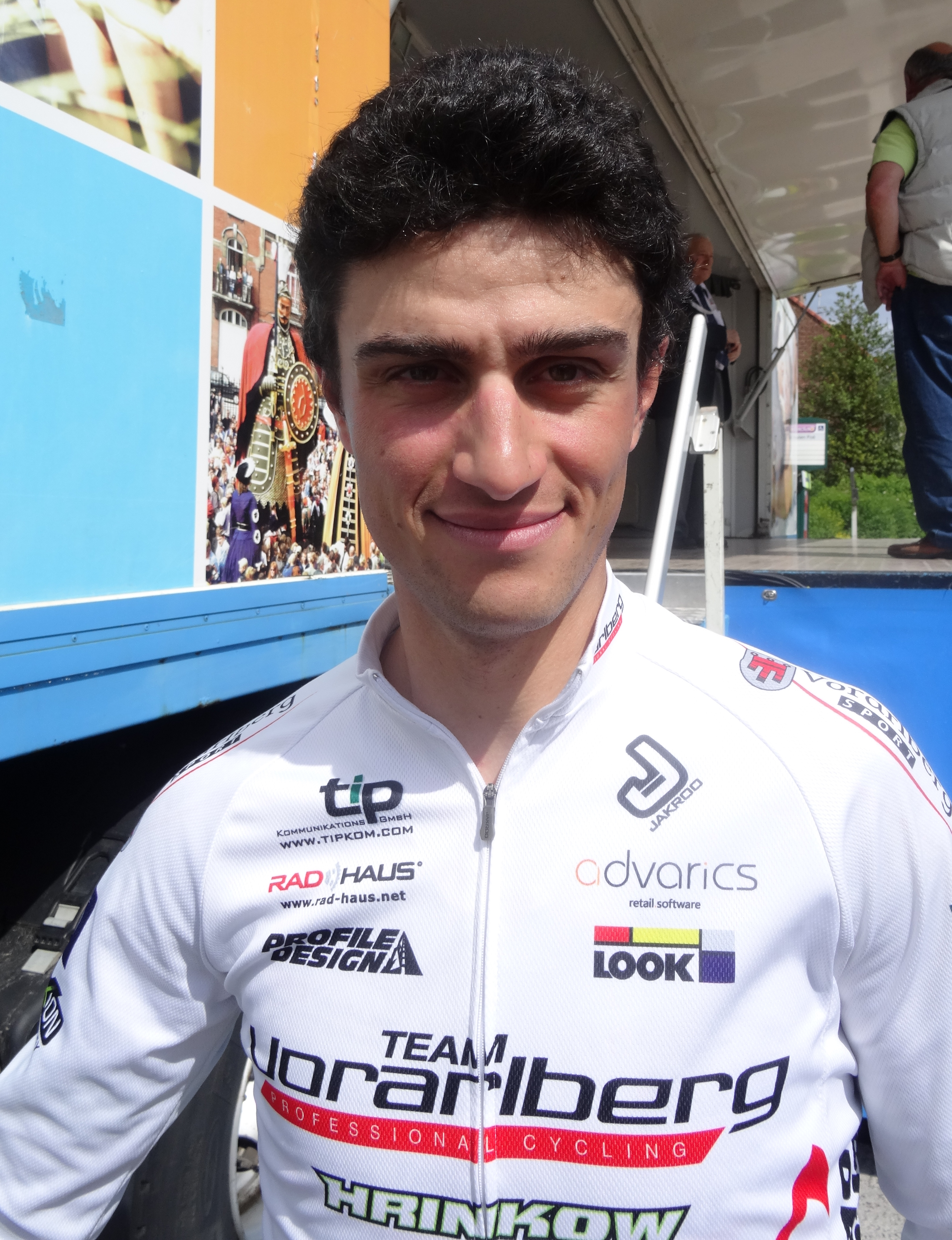 Reportage photographique réalisé le vendredi 23 mai 2014 à l'occasion du départ de la première étape du Paris-Arras Tour 2014 à Lens, Pas-de-Calais, Nord-Pas-de-Calais, France. Depicted person: Nicolas Baldo